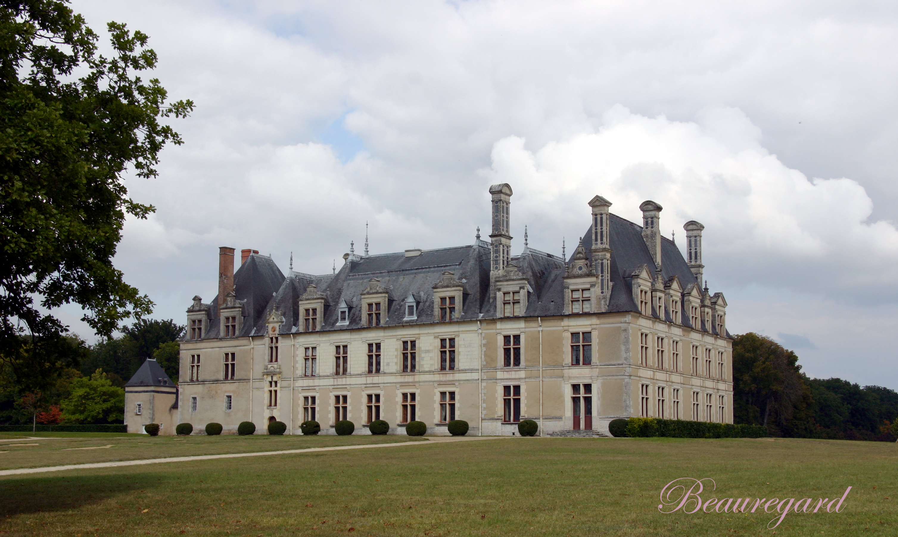 Château de Beauregard